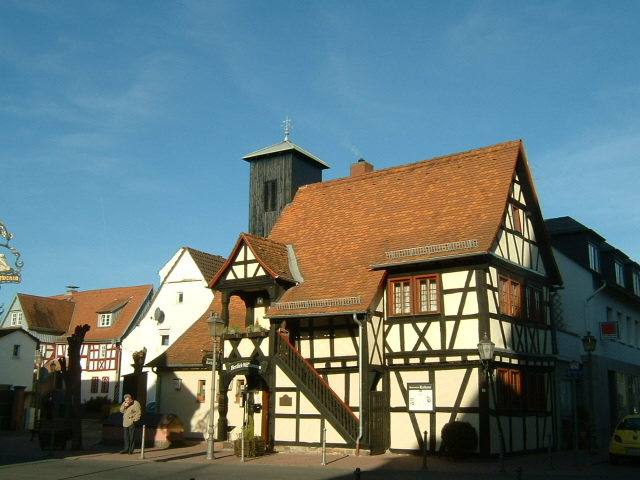 Schwalbach am Taunus, ehemaliges Rathaus Schulstraße 2, Fachwerkhaus